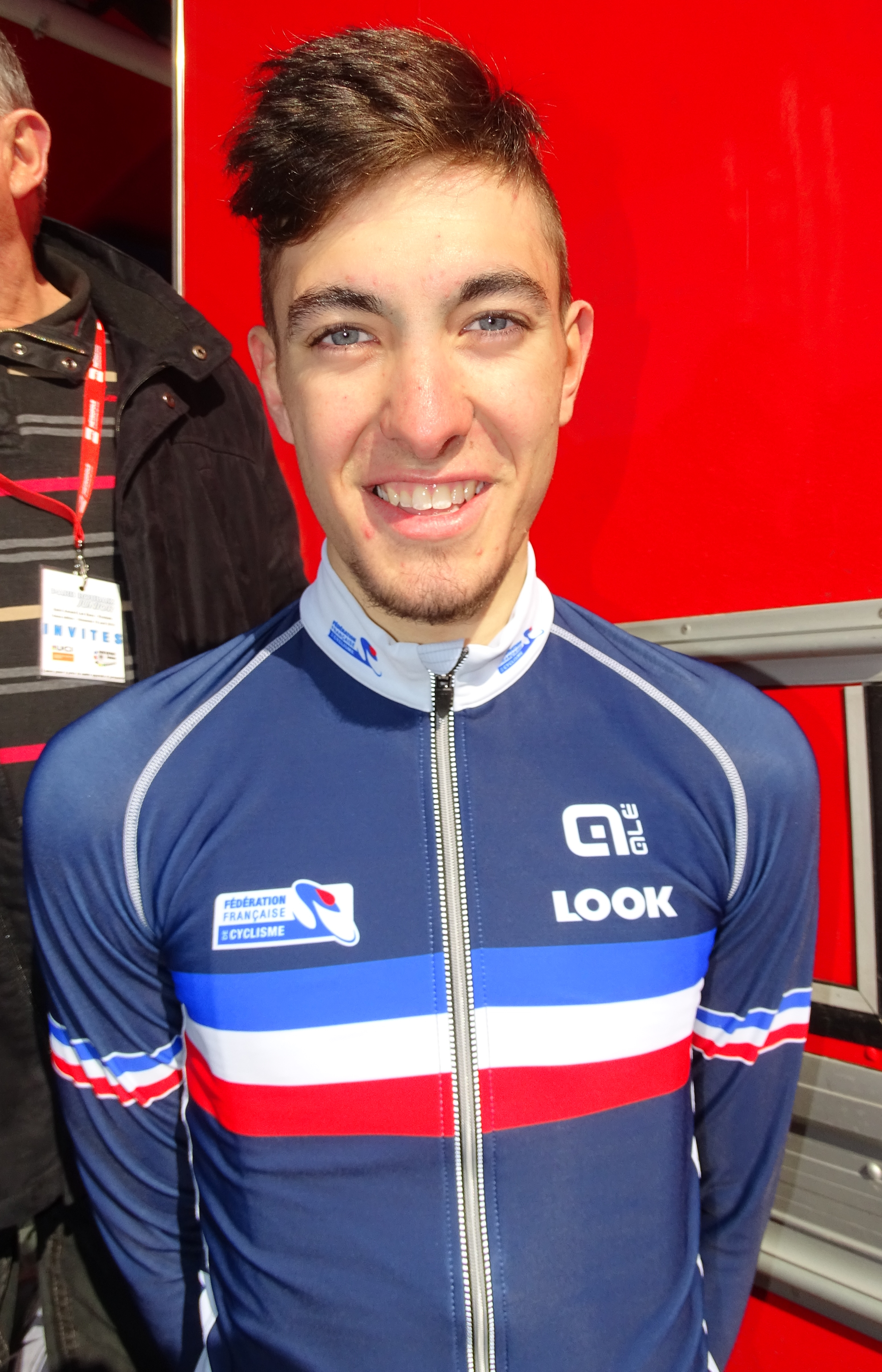 Reportage réalisé le dimanche 10 avril à l'occasion du départ du Paris-Roubaix juniors 2016 à Saint-Amand-les-Eaux, France.